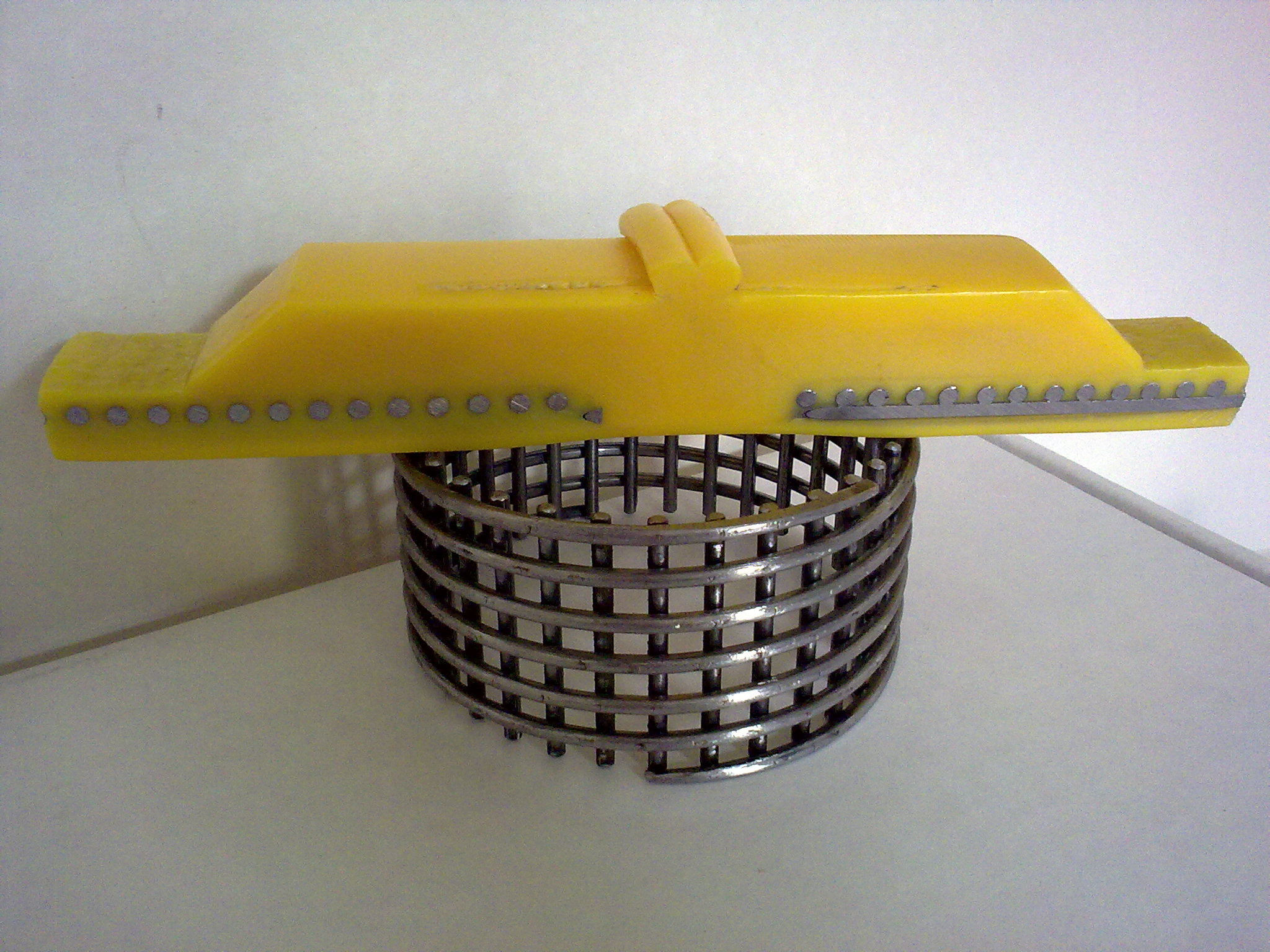 Сварка между торцами законцовок, смонтированных на металлополимерных трубах.